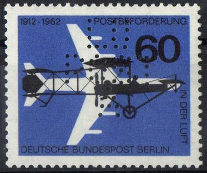 Сувенирная марка Западного Берлина, выпущенная для международной авиафилателистической выставки «Люпоста 1962» Graphics by Michel und Kieser Ausgabepreis: 60 Pfennig First Day of Issue / Erstausgabetag: 12. September 1962 Michel-Katalog-Nr: 230